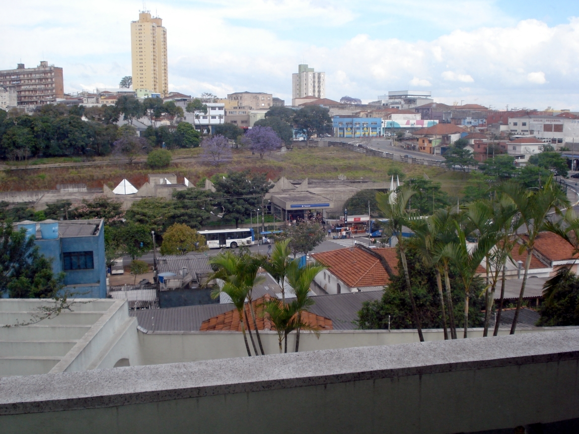 Vista para a Estação Tucuruvi, bairro do Tucuruvi, zona norte de São Paulo, SP.